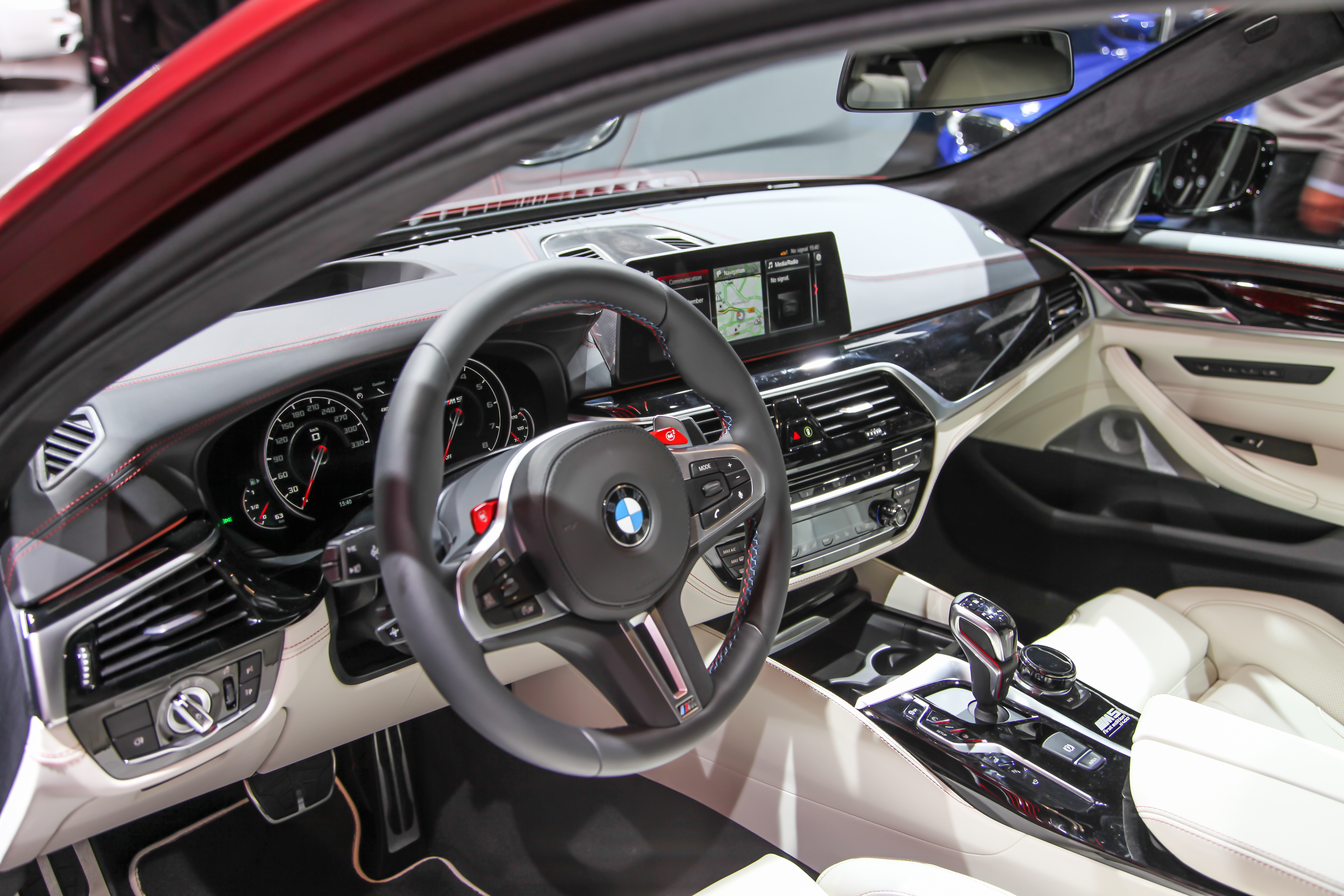 BMW M5 (F90) First Edition, Cockpit